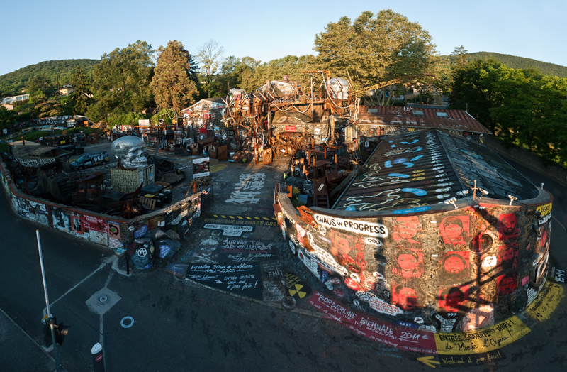 Vision demente et panoramique de la Demeure du Chaos